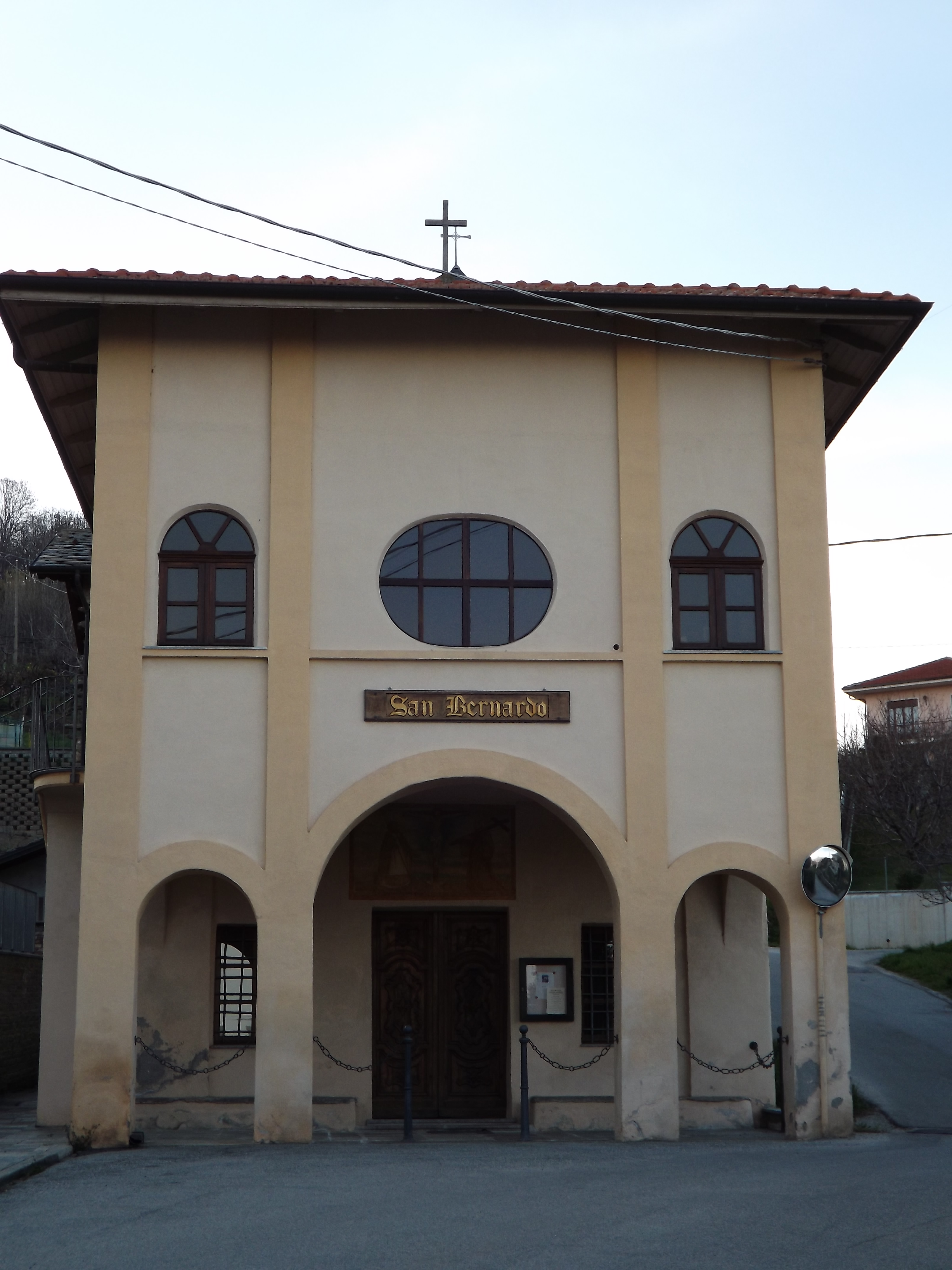 La cappella di San Bernardo si colloca nella località omonima della frazione Ronchi di Cuorgnè. L'edificio è posto al centro dell'abitato, accanto alla struttura che un tempo ospitava la scuola elementare. La costruzione sorge in continuità con il fabbricato della canonica, posto sul retro della cappella. Ha pianta rettangolare, ad aula unica, suddivisa in tre campate. La facciata è rivolta a levante. Il fronte, rettangolare, presenta atrio coperto nella parte inferiore. Sopra la porta è dipinto un affresco raffigurante i Santi Bernardo da Mentone e Bernardo Abate, con al centro il Crocifisso, datato 1700. Nel registro superiore della facciata, sull'asse centrale, è collocata una finestra ellittica, affiancata a sua volta da due finestre ad arco. La struttura portante è in muratura mista, intonacata sia sul lato interno che quello esterno. Nel complesso l'edificio presenta un buono stato di conservazione. La cappella è officiata una volta al mese.